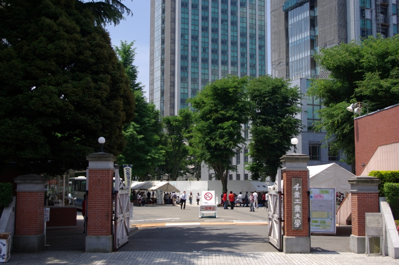 鉄道第二連隊正門